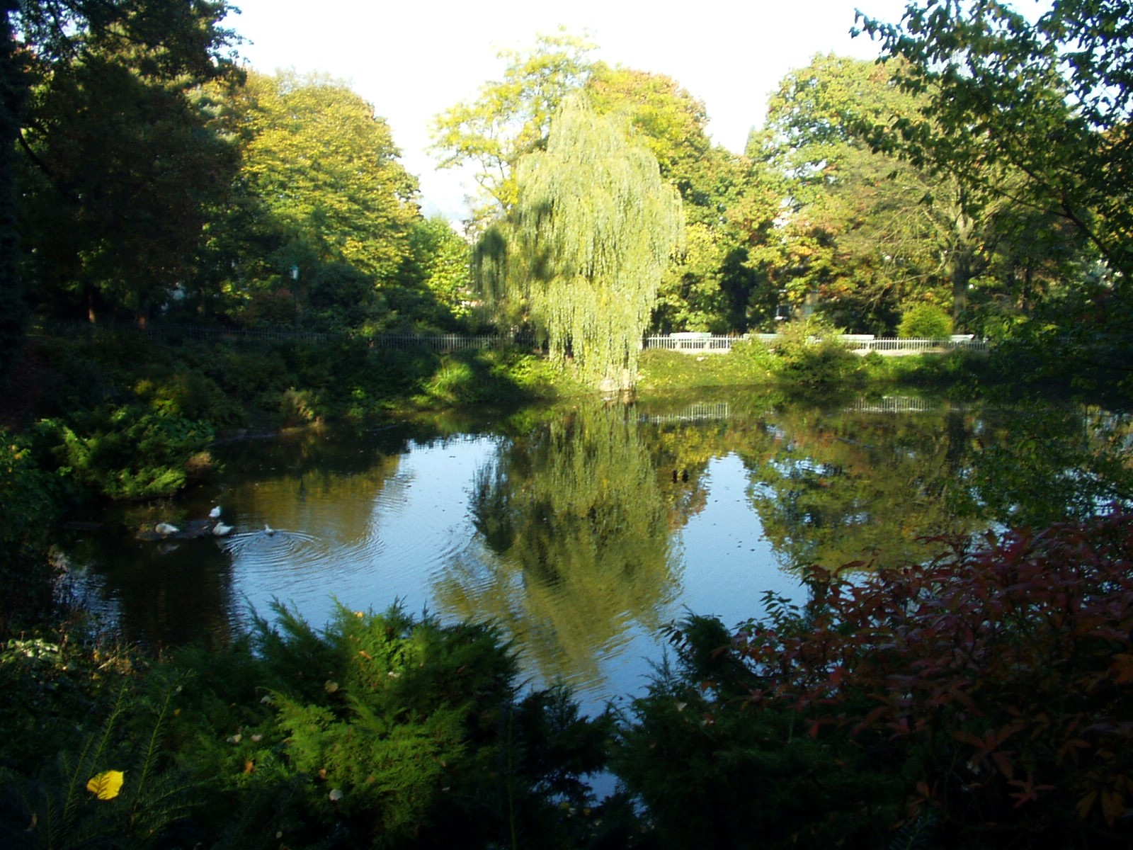 Fischteich in den Barmer Anlagen. Eigenes Foto. 161005. Urheber: manos